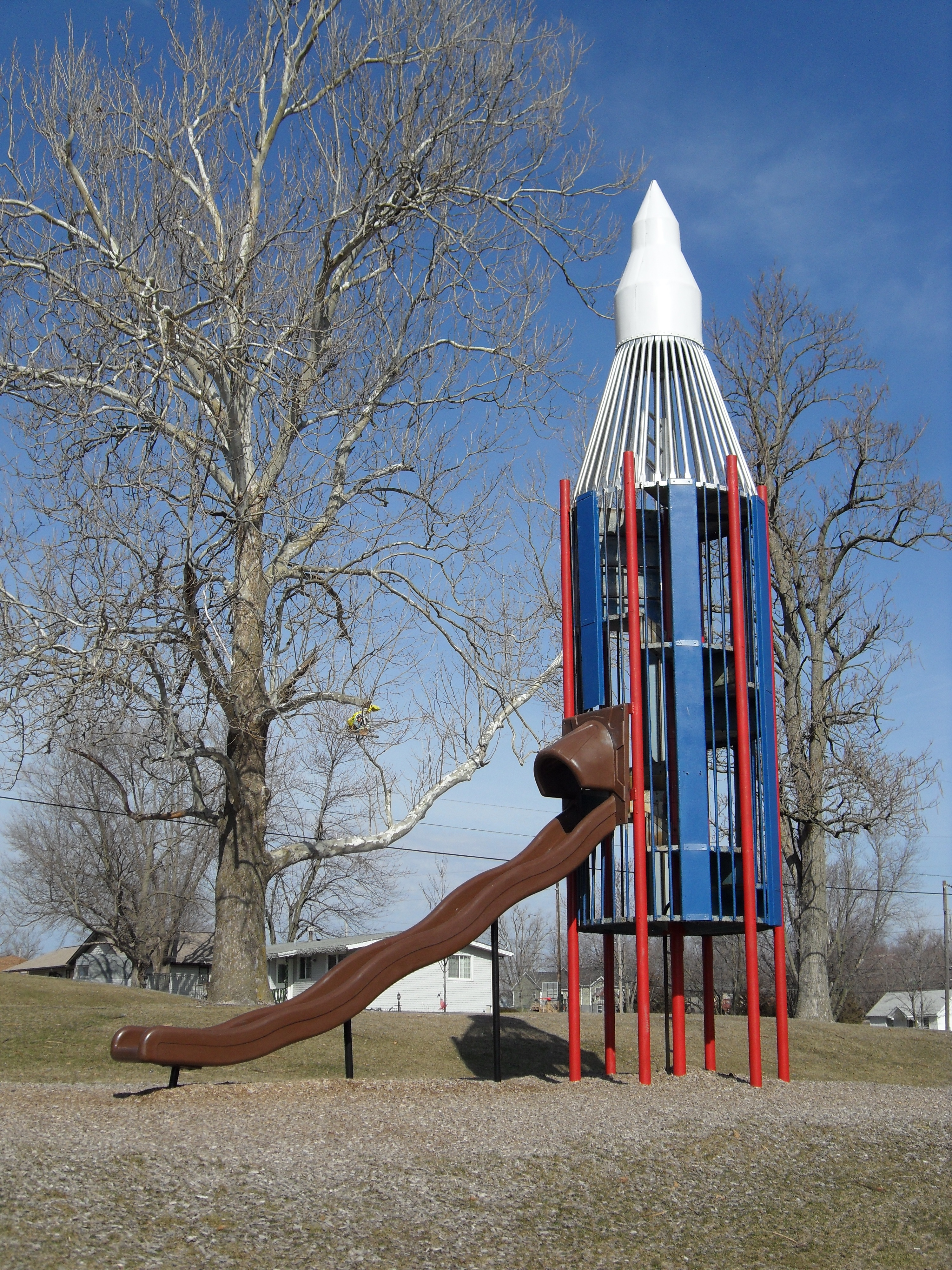 Rocket Slide in Edmundson Park, Oskaloosa, Iowa